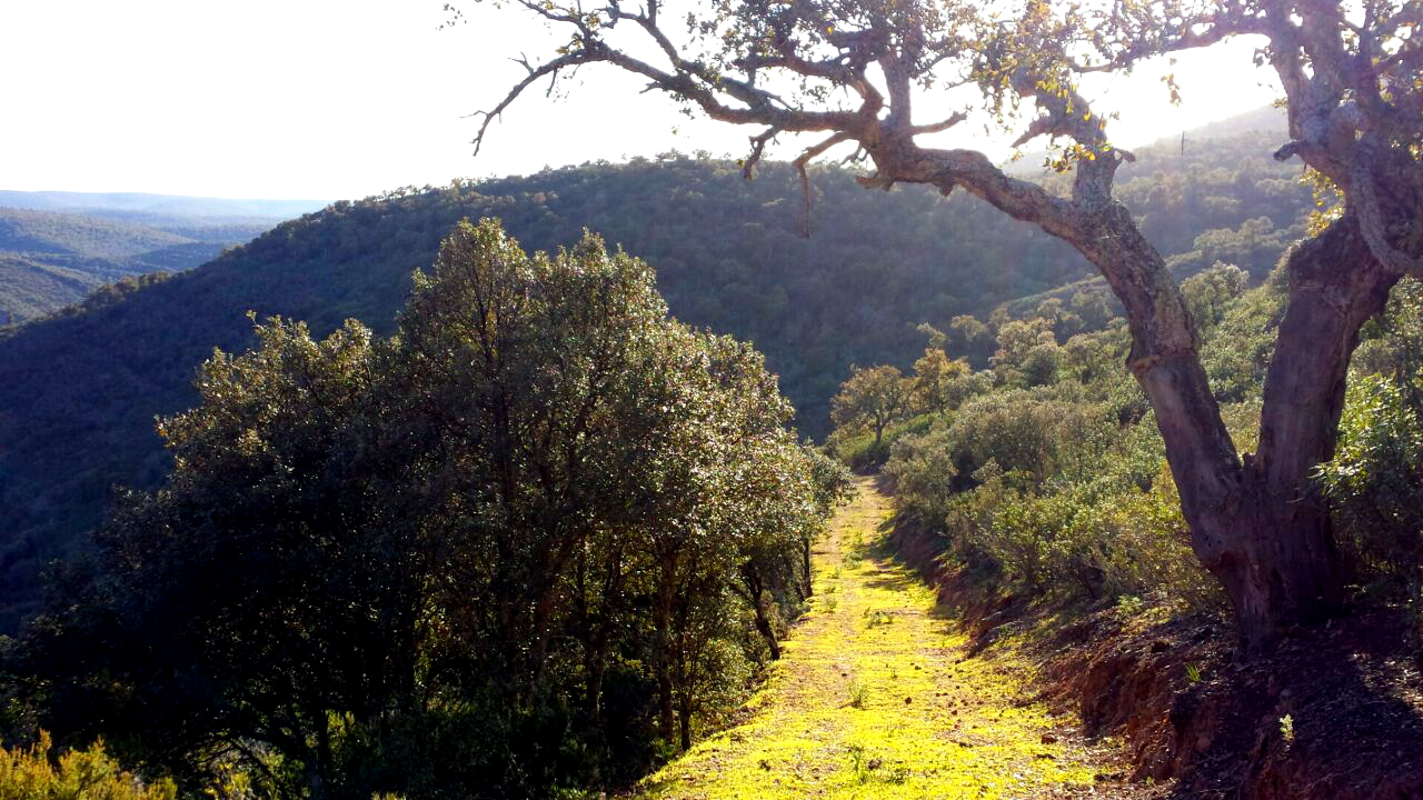 Paisaje de Gargantilla, en el Parque Nacional de Cabañeros